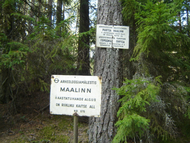 Purtsa maalinna tähistav silt